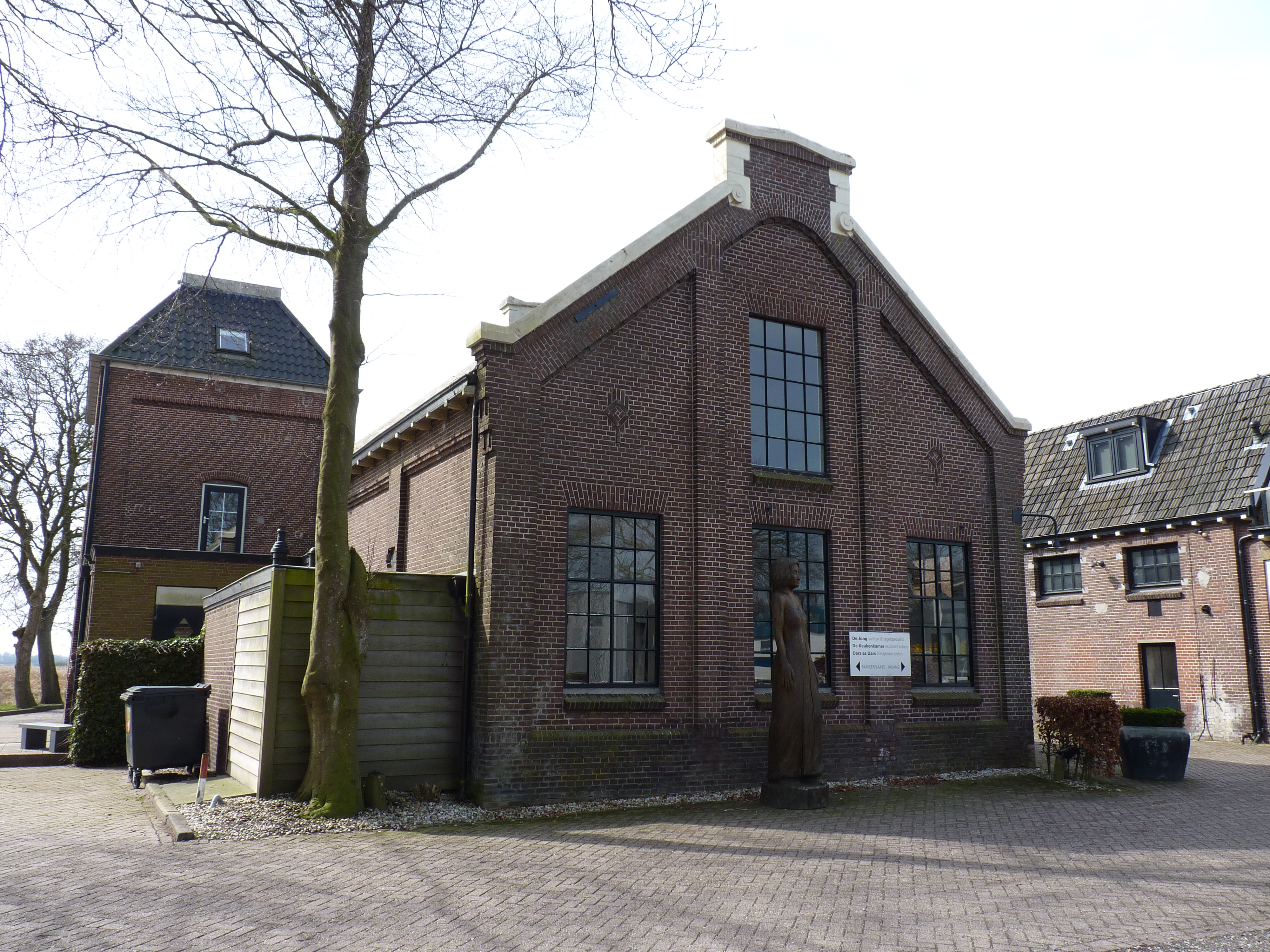 Giekerk Machinekamer en Watertoren